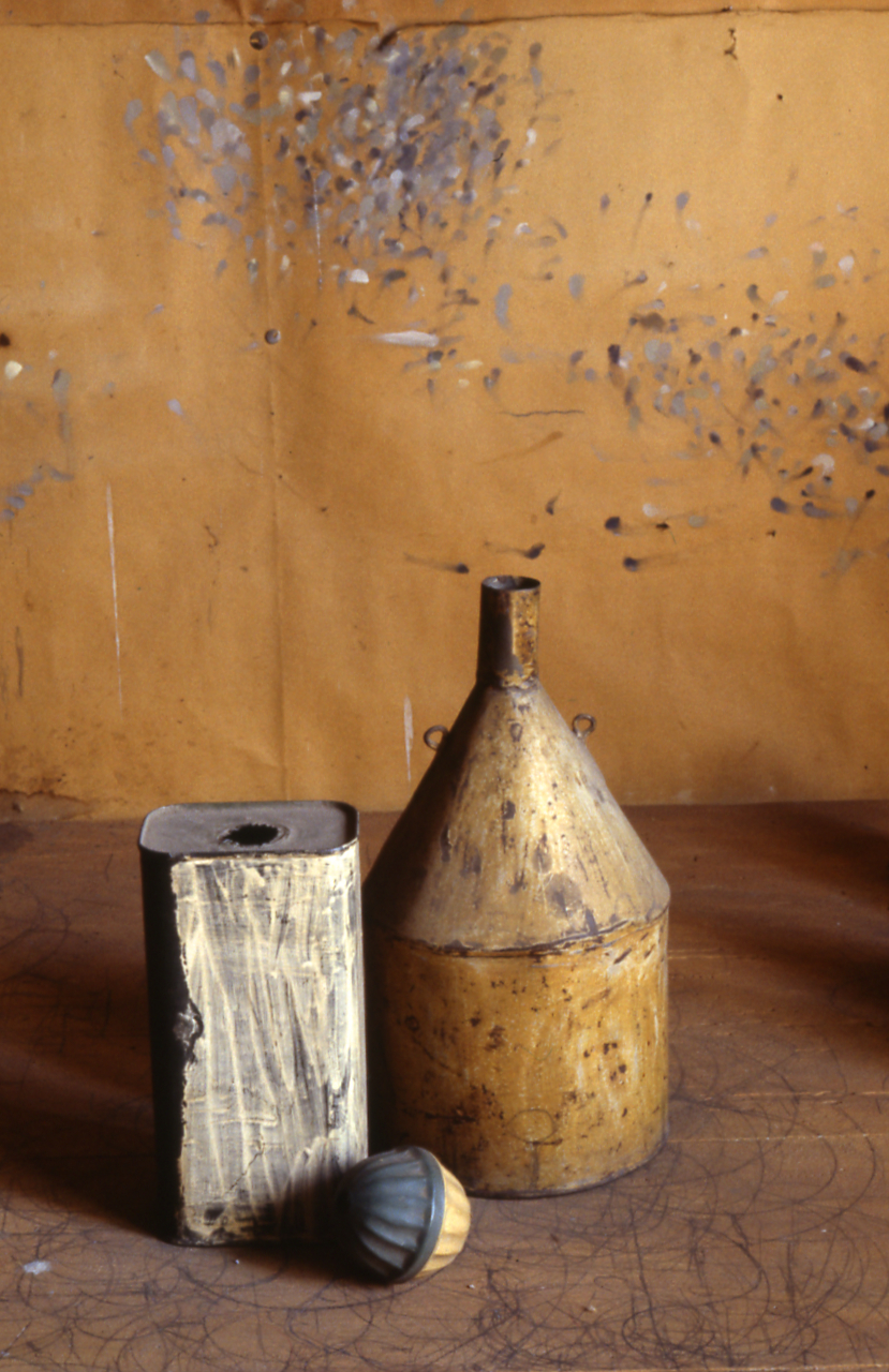 Servizio fotografico : Bologna, 1981 / Paolo Monti. - Foglio: 1, Fotogrammi complessivi: 7/20 : Diapositiva, sviluppo cromogeno/ pellicola ; 35 mm. - ((Sullo chassis della diapositiva n.1 Monti specifica: "Morandi studio". - Occasione: Documentazione eseguita in collaborazione con Nino Castagnoli per l'Assessorato cultura di Bologna in occasione della mostra Morandi in USA (luoghi appenninici e studio del pittore). - Fonte: Agenda di Paolo Monti: Diapositive 24x36mm (1948-1982), presso Archivio Paolo Monti. - Fonte: Fattura di Paolo Monti: IV. Commesse/ Fattura n. 36 (1981/10/22), presso Archivio Paolo Monti